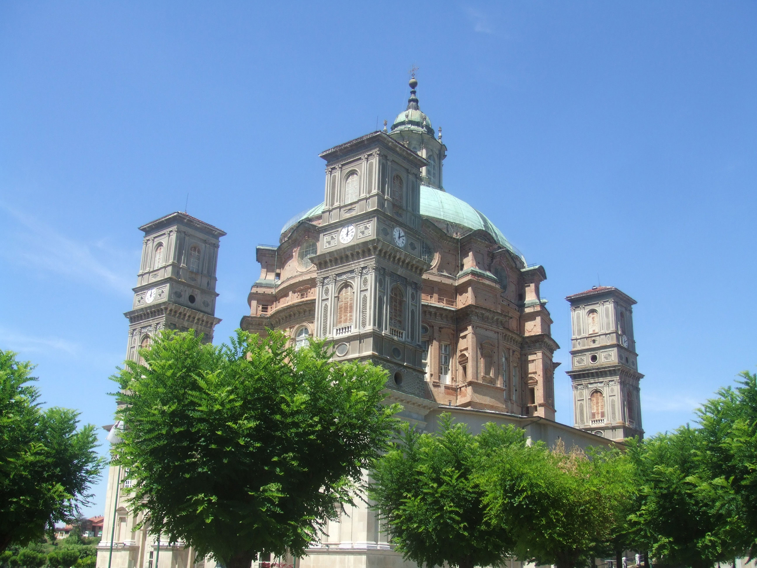 Vue extérieure du dôme et des quatre campaniles - Sanctuario di Vicoforte (Italie)